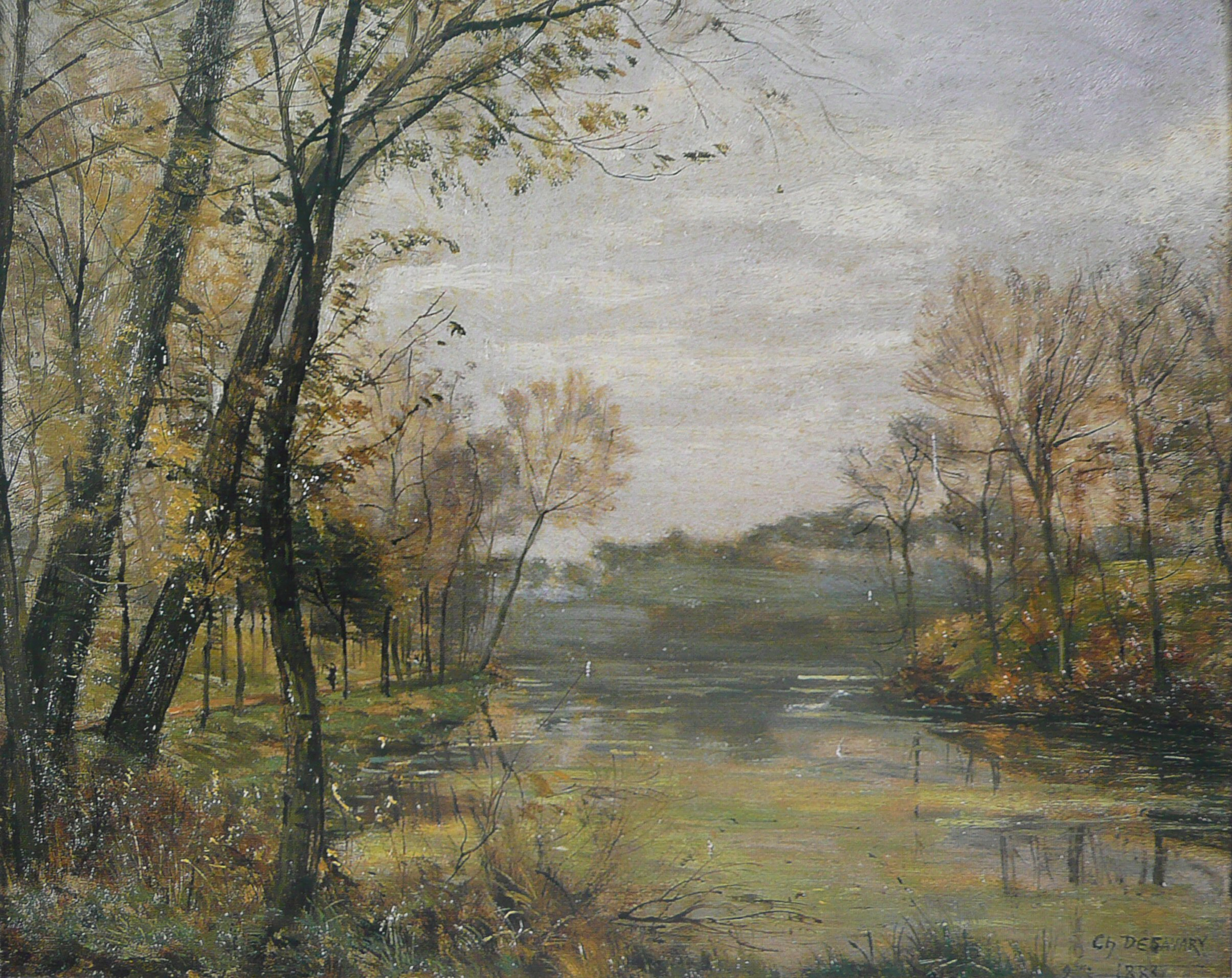 La Scarpe à Arras, novembre (Les Douze mois, 1883)